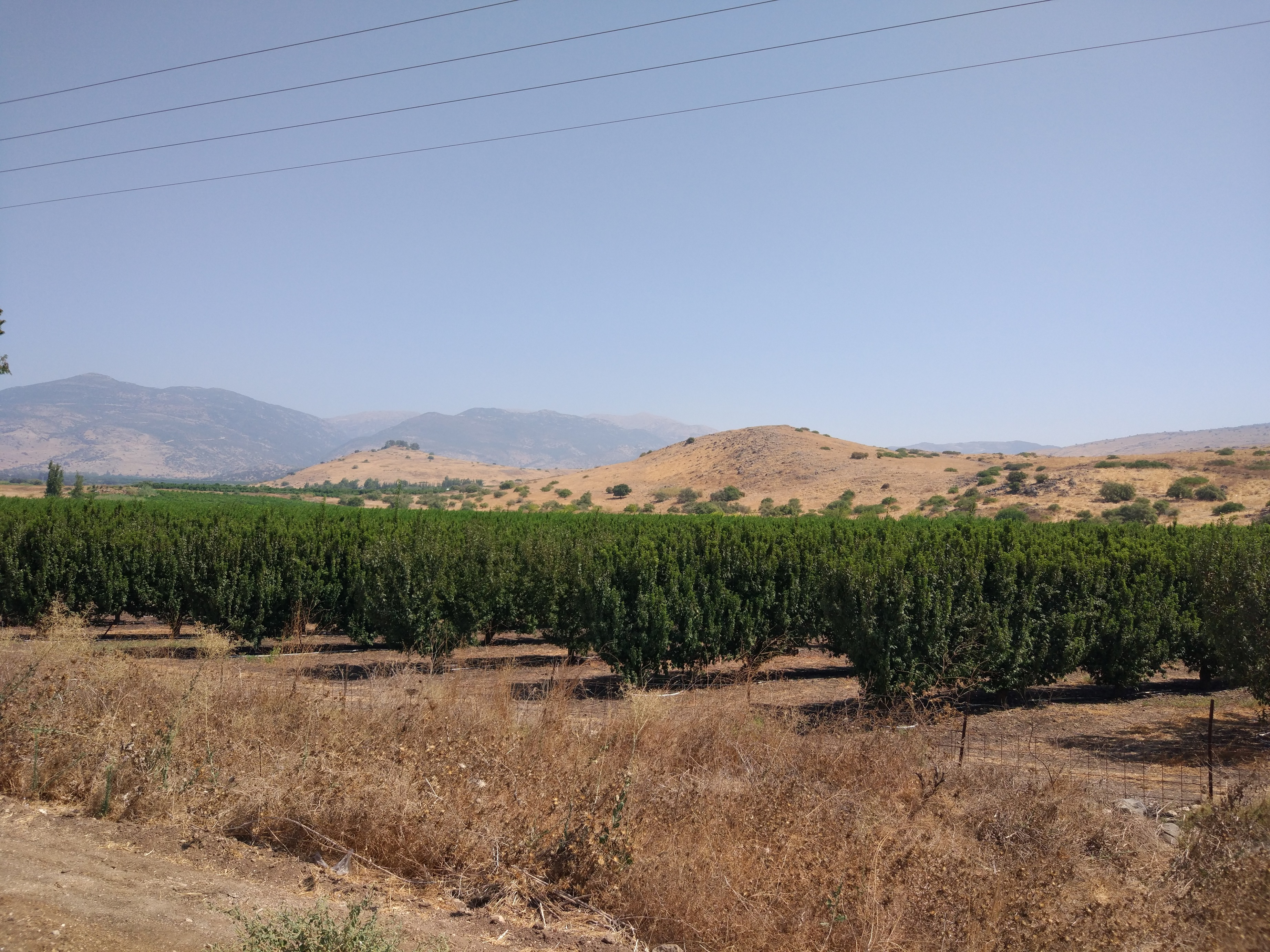 גבעת האם מימין. הגבעה משמאל עם העצים בראשה היא תל עזזיאת. ברקע רכס החרמון